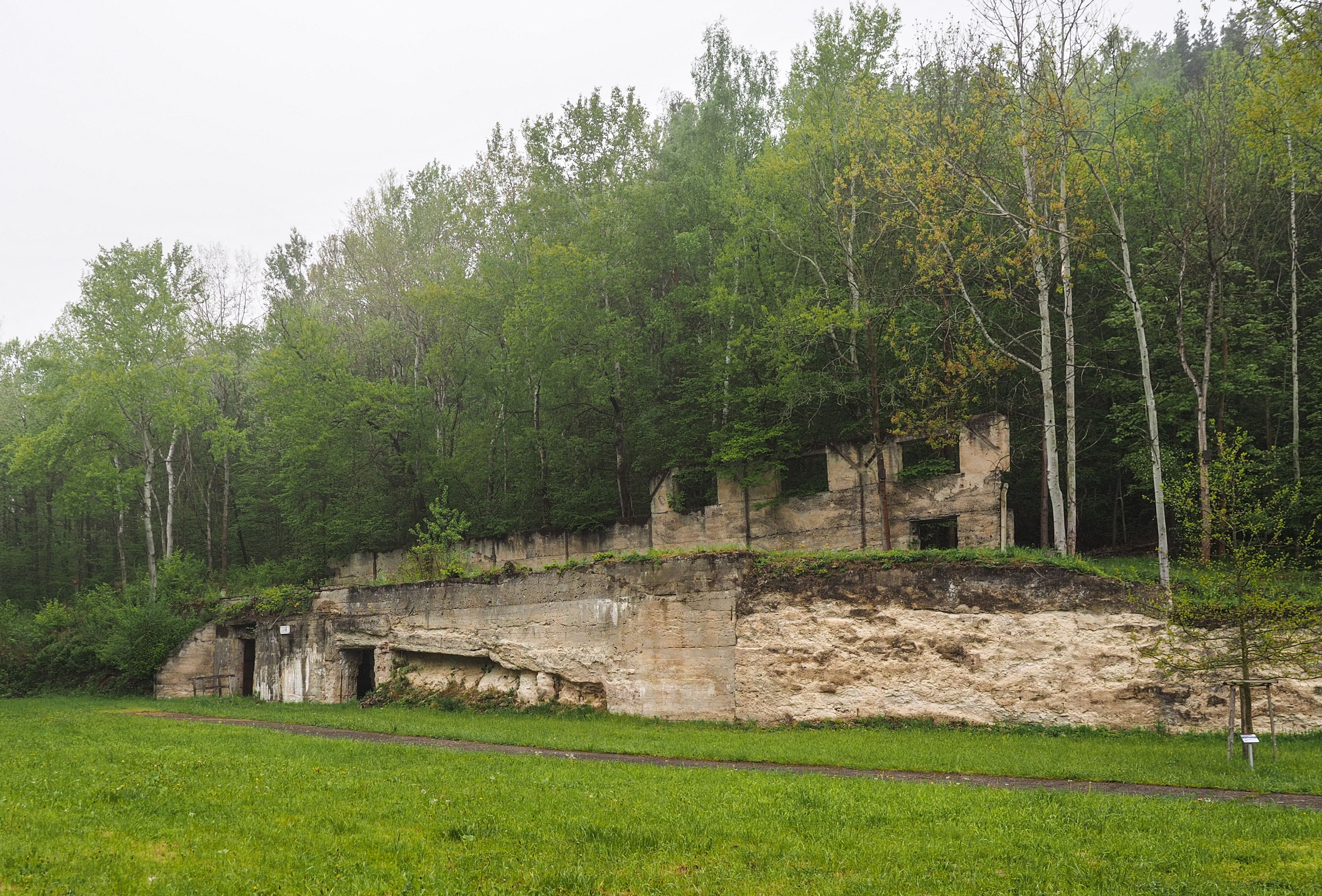 Ehemalige Rüstungsfabrik REIMAHG bei Kahla, Thüringen